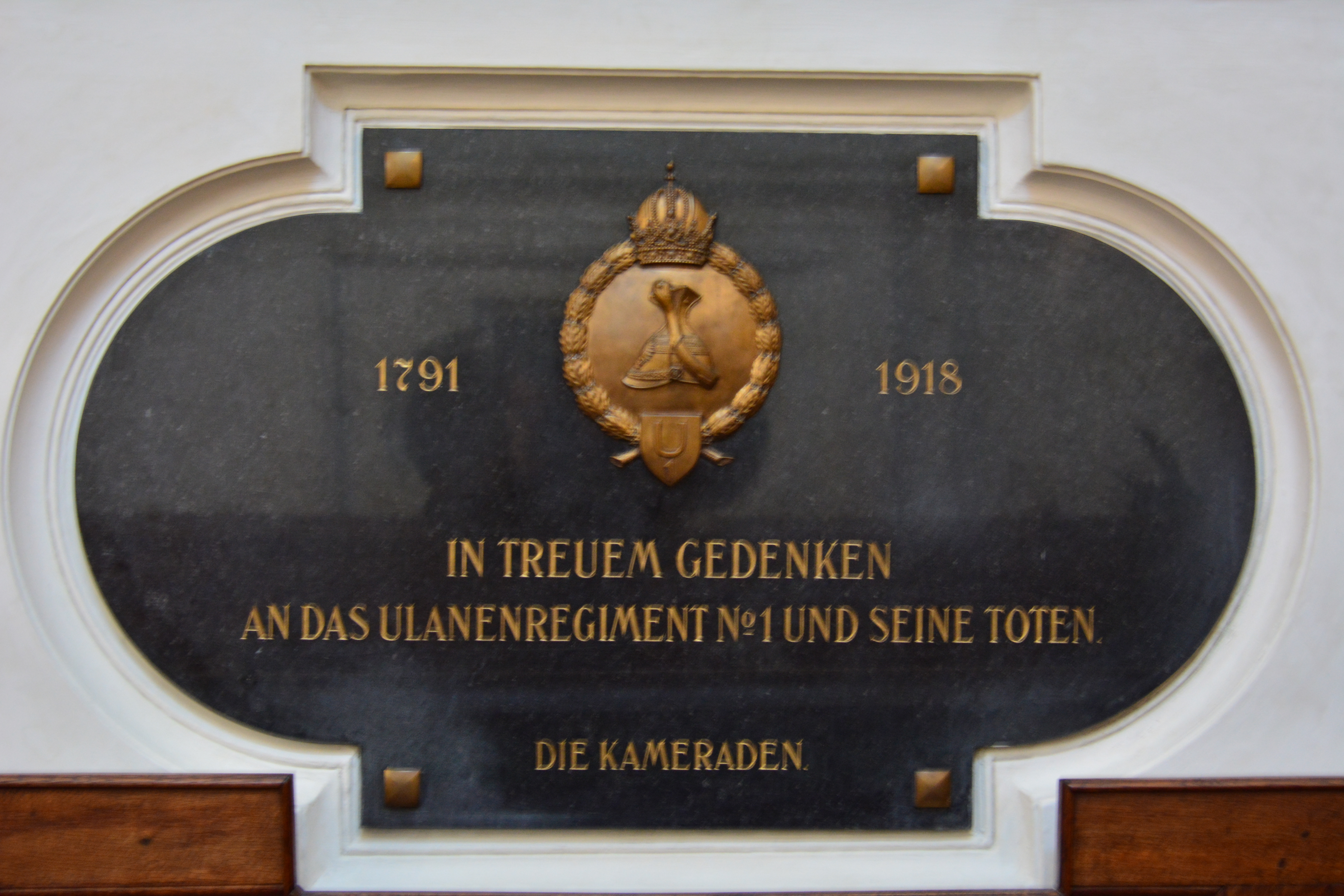 Gedenktafel für das k.u.k. Ulanenregiment Nr. 1 (Wien, Neuer Markt, Kapuzinerkirche)